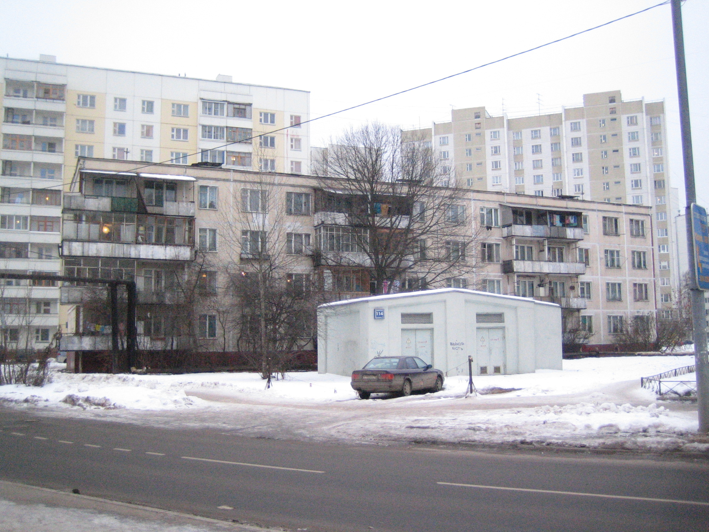 4-хэтажный дом серии к-7 в Зеленограде (с балконами)